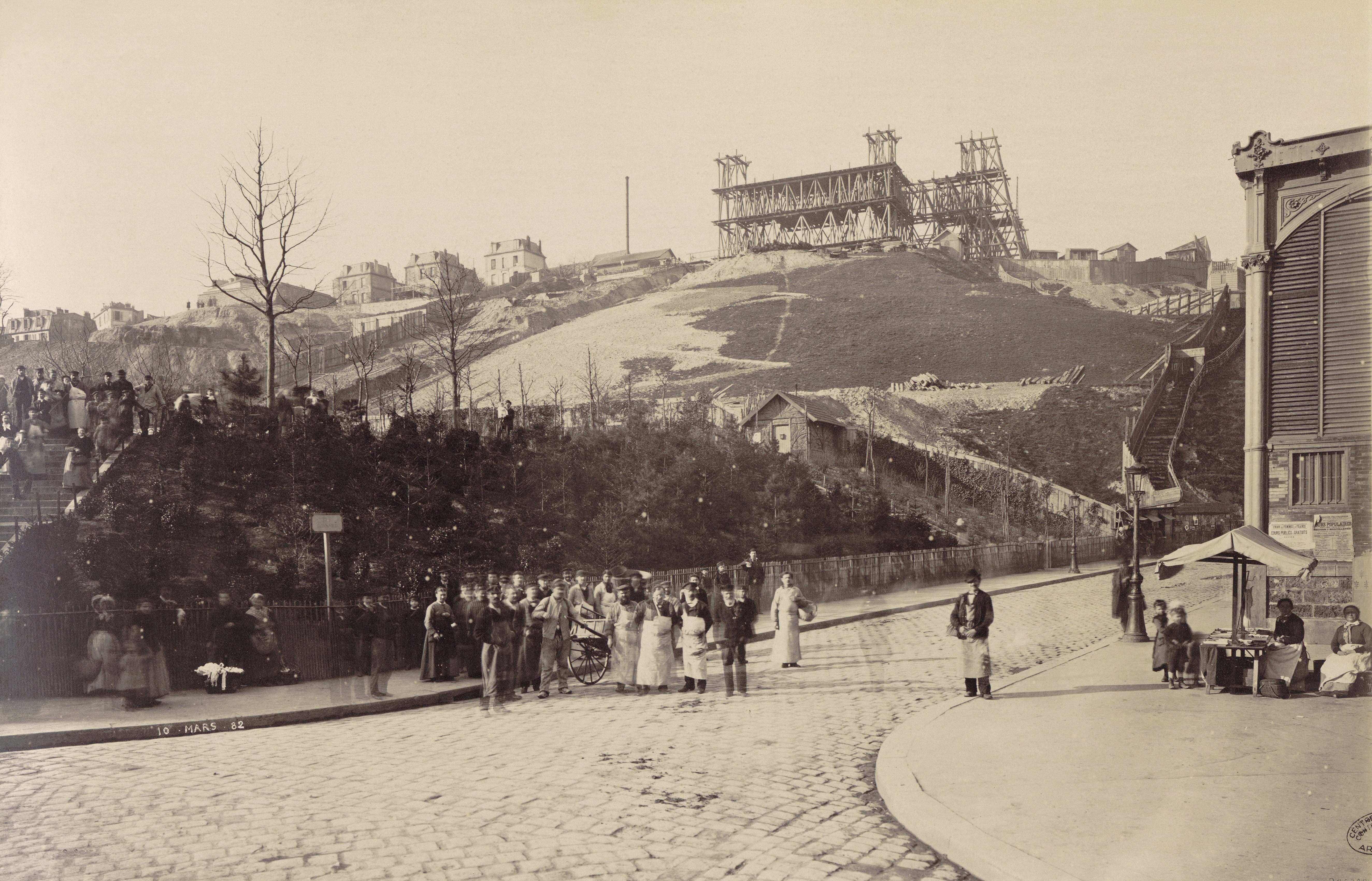 Au premier plan, le square Saint-Pierre (1877). À droite, la rue Ronsard et le marché de Montmartre (aujourd’hui dite la “halle Saint-Pierre”), marché public alimentaire de 284 places construit en 1867 et inauguré le 2 janvier 1868. En fer, 36 sur 82 m, toiture soutenue par 52 colonnes en fonte, 34 fenêtres de 3,5 m de haut. Construit et exploité en concession par la Compagnie générale des marchés. Remplace l’ancien marché découvert de la place Saint-Pierre.